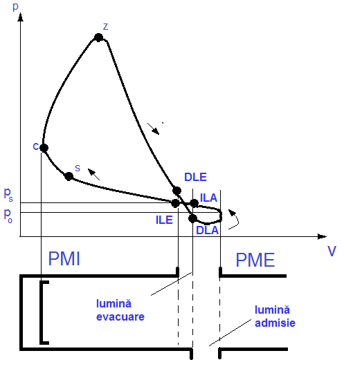 Diagrama de funcționare a motorului în 2 timpi